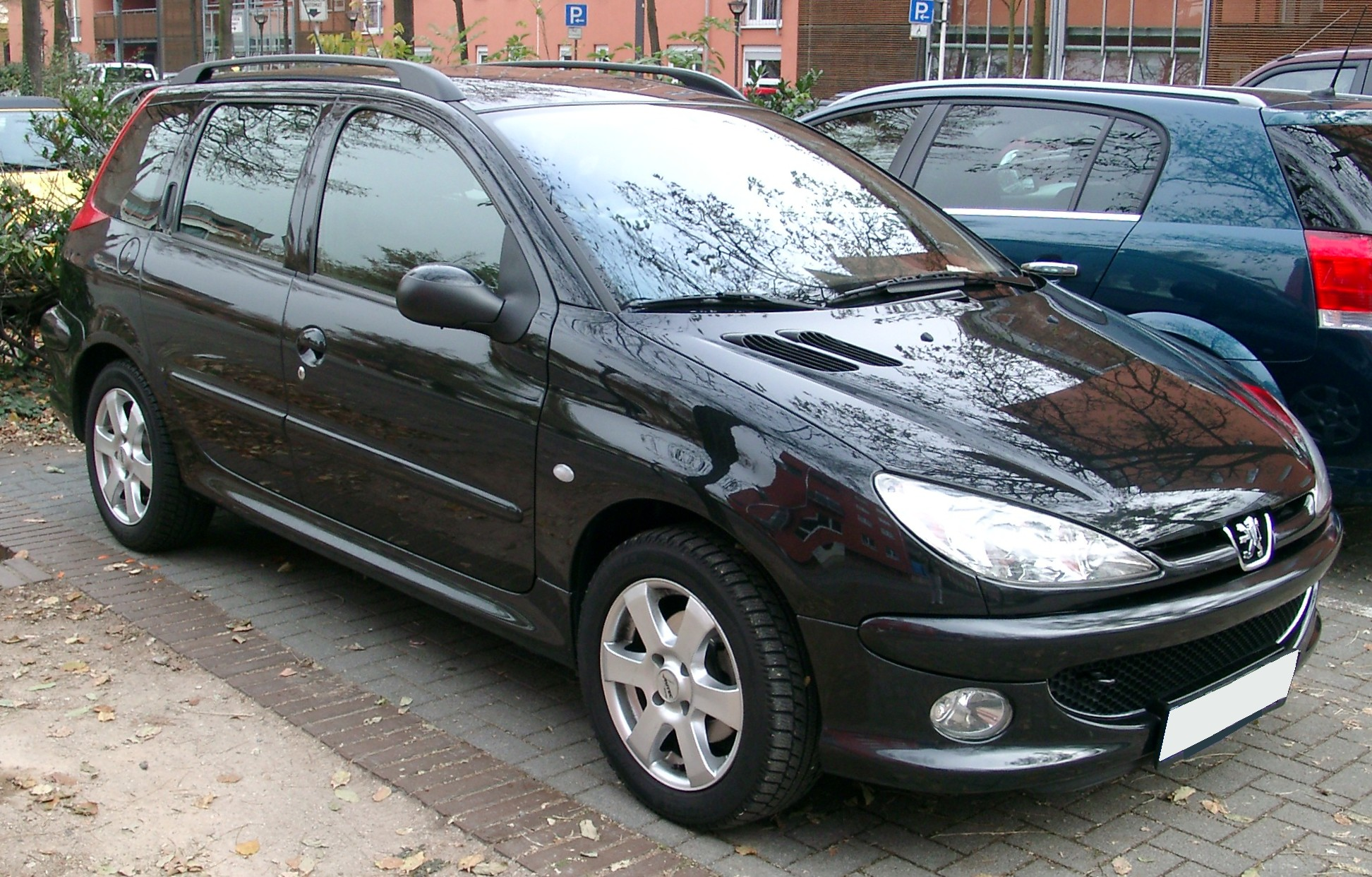 Peugeot 206 SW